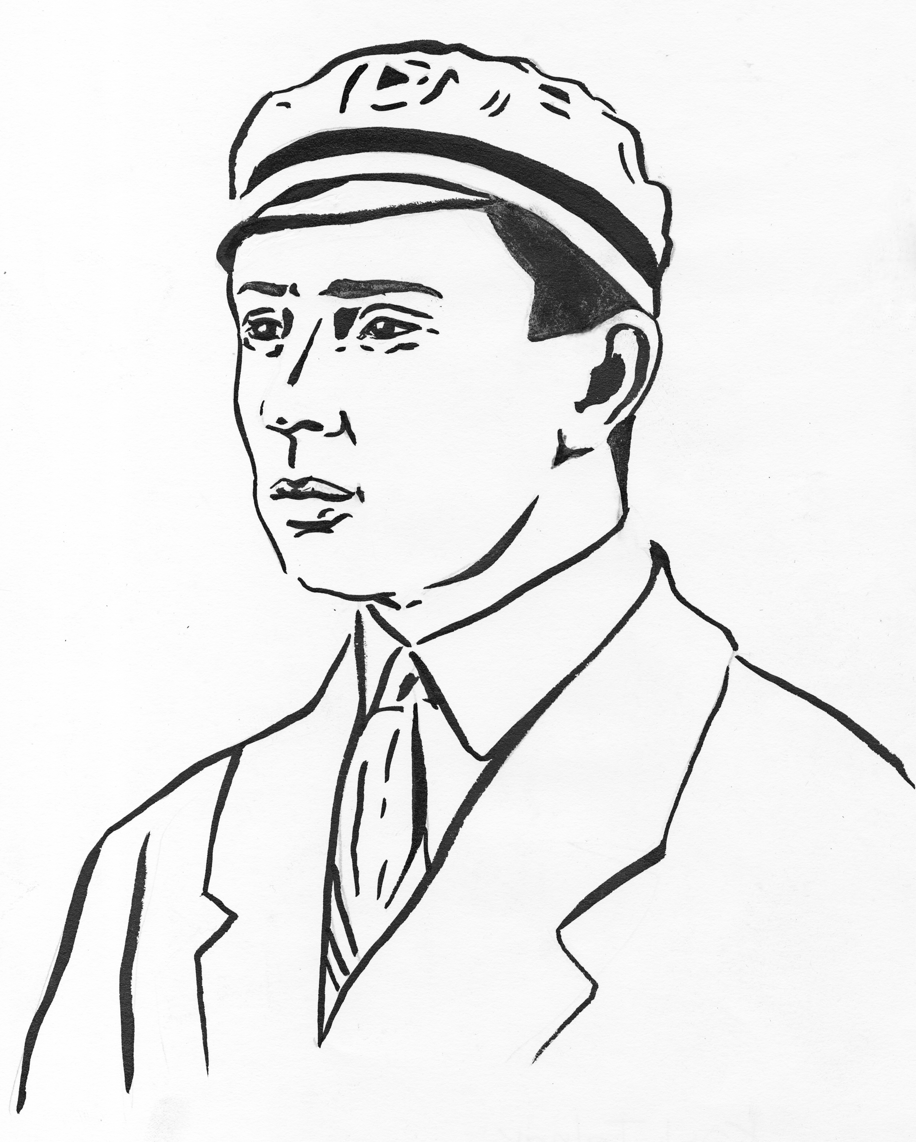 Karl Talpak, tušš